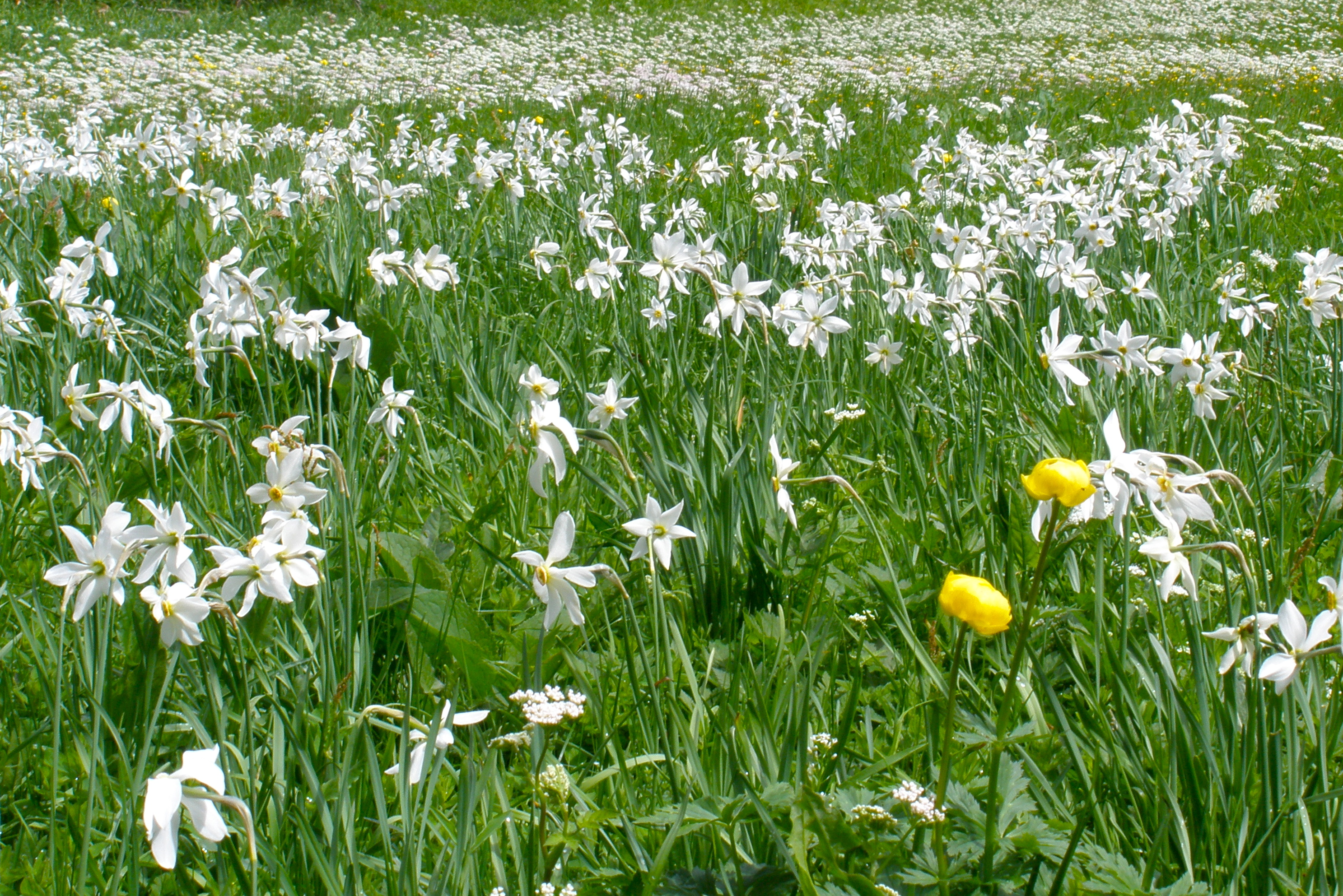 Narzissenwiese bei Bad Aussee im Steirischen Salzkammergut